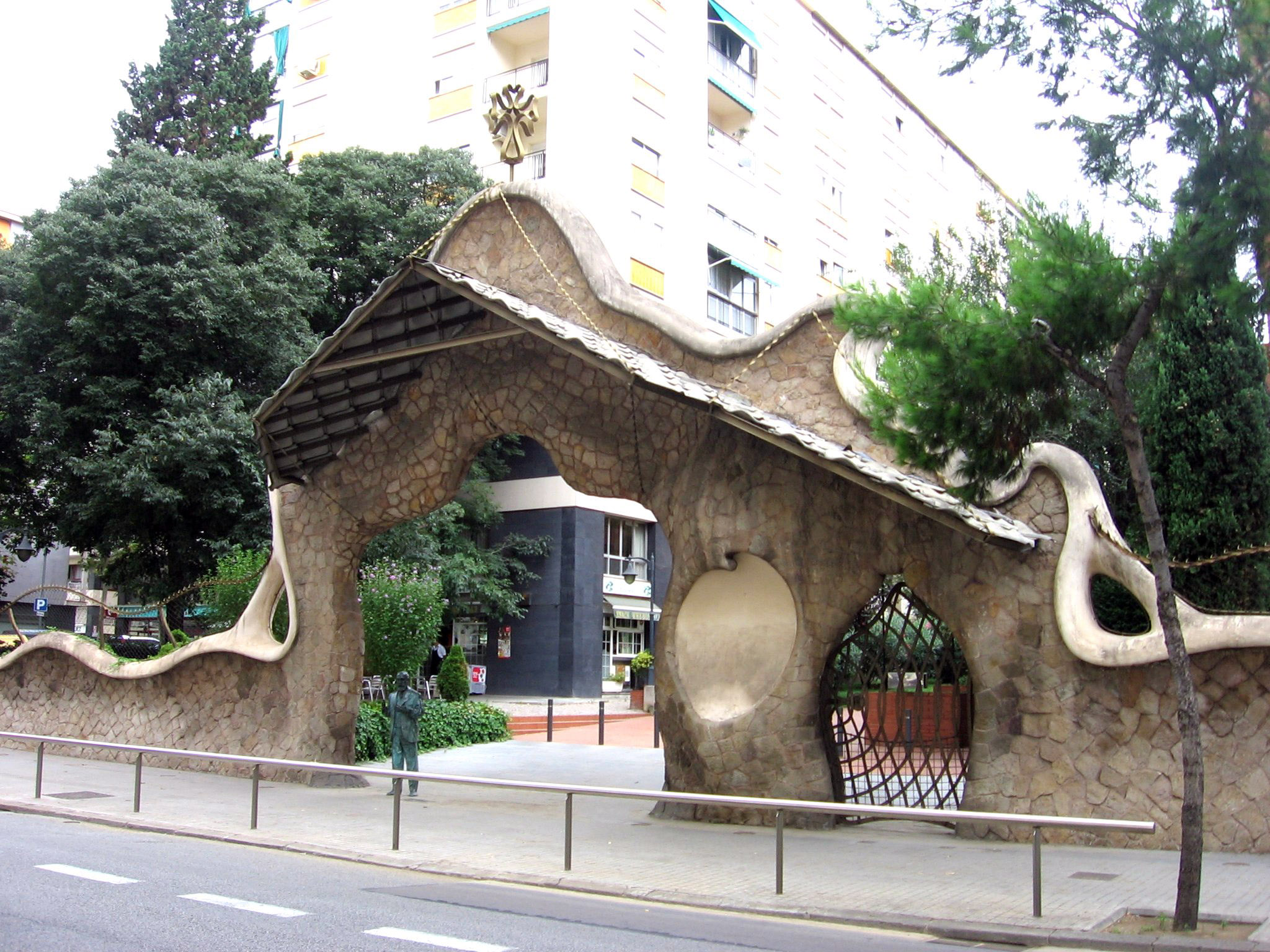 Puerta de la Finca Miralles, de Antoni Gaudí